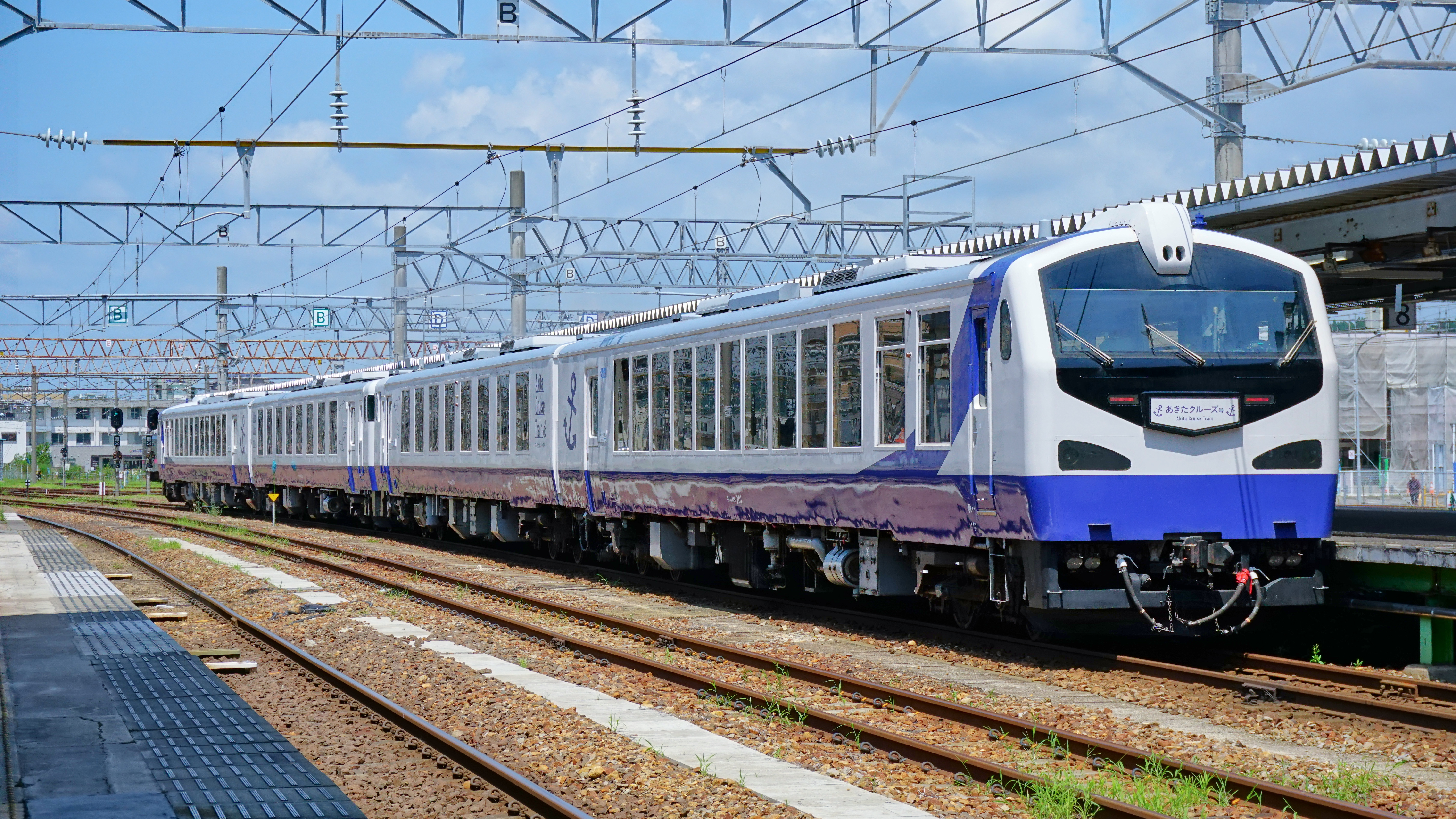 秋田駅を出発するあきたクルーズ号。秋田港に大型クルーズ客船が寄港した際にだけ運行される臨時列車で、キハ47系旧「リゾートしらかみ」橅編成を種車とする。